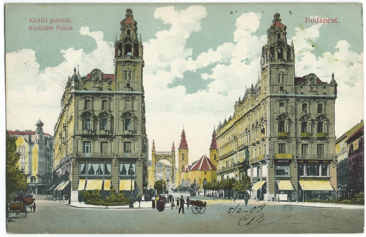 Vue de Budapest au début du XXe siècle.